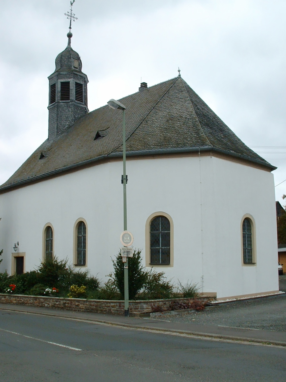 Evangelische Kirche Bruchweiler, Aussen